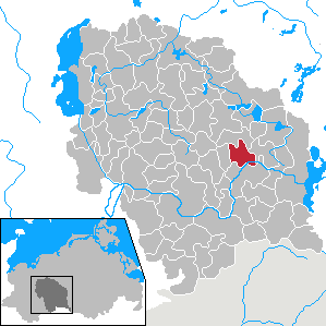 Passow in Mecklenburg-Vorpommern - District Parchim